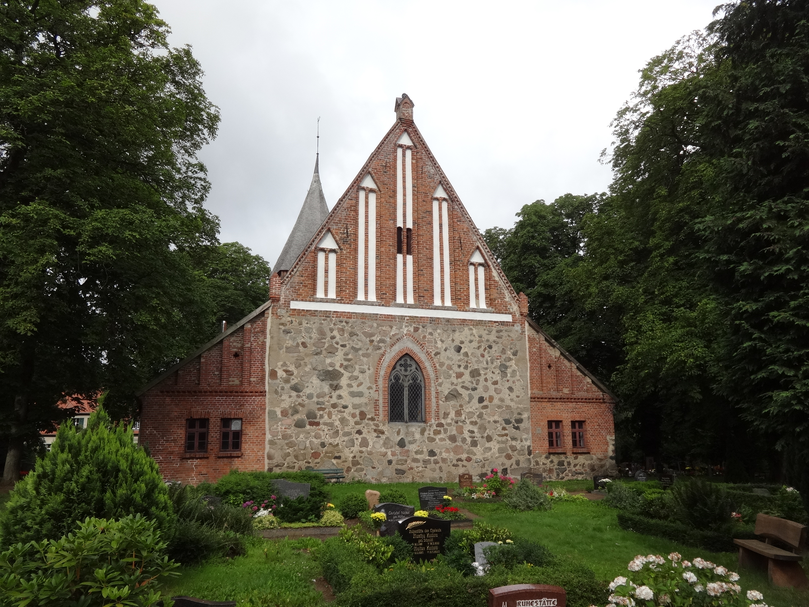 Feldsteinkirche aus dem 13. Jahrhundert in Dersekow, Mecklenburg-Vorpommern